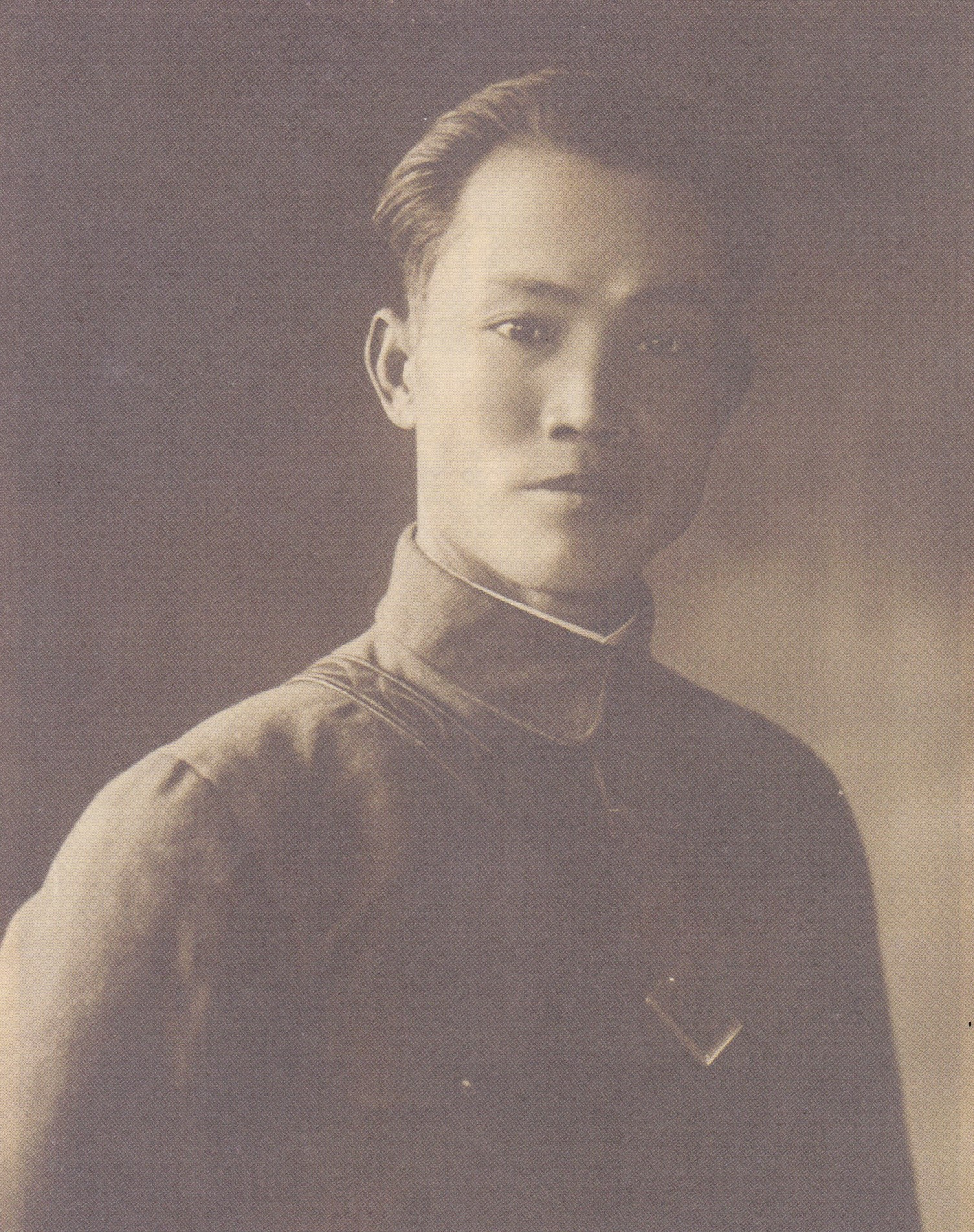 陳誠, 字辞修 (1897 - 1965)